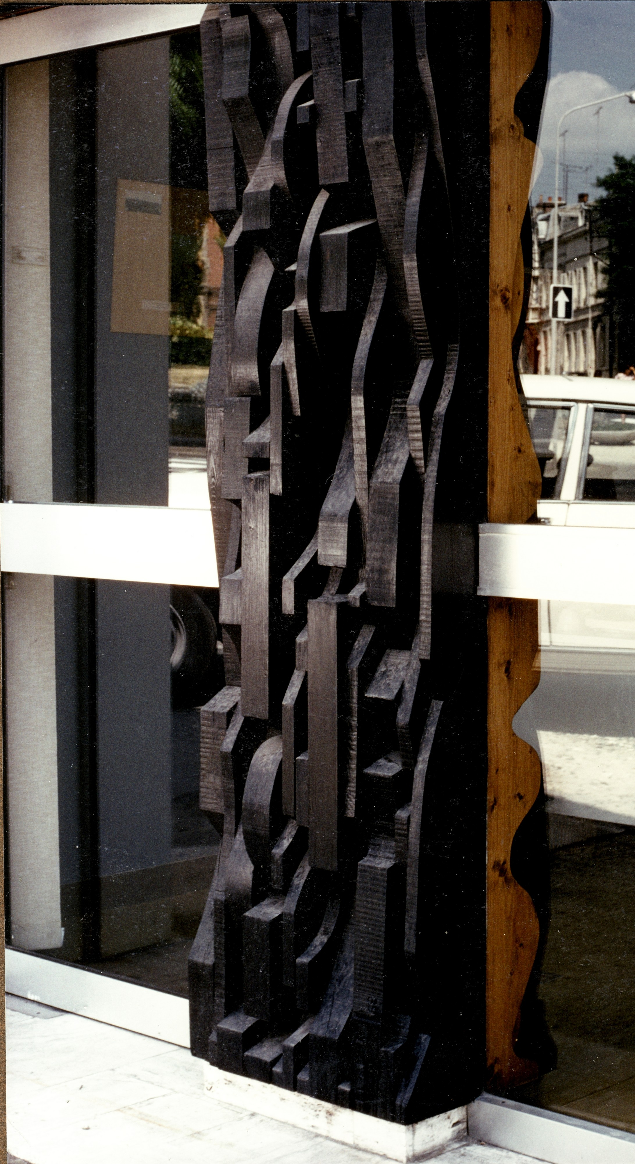 Composition 2.20 x 0.70 x 50 m. en bois, patiné foncé à l’extérieur, naturel face intérieur. 1969